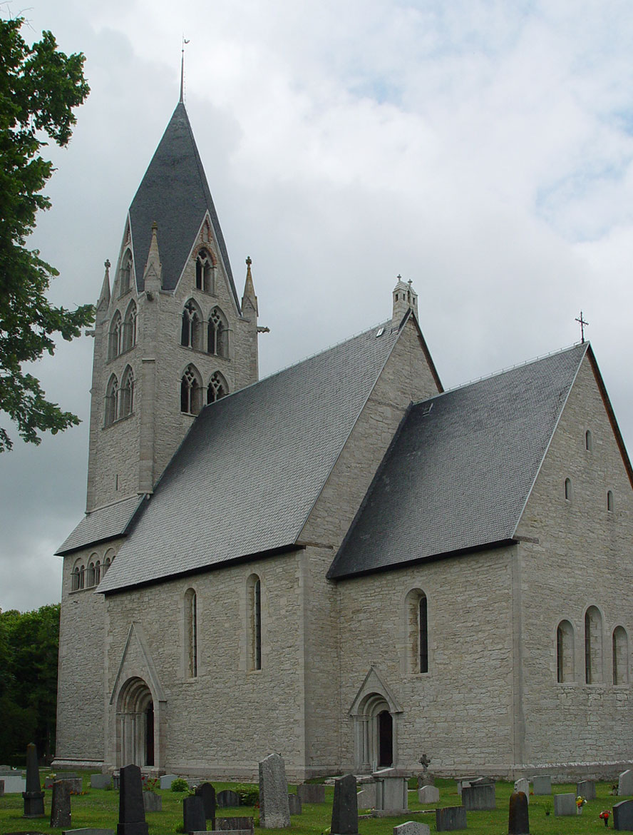 Dalhems kyrka (Gotland)